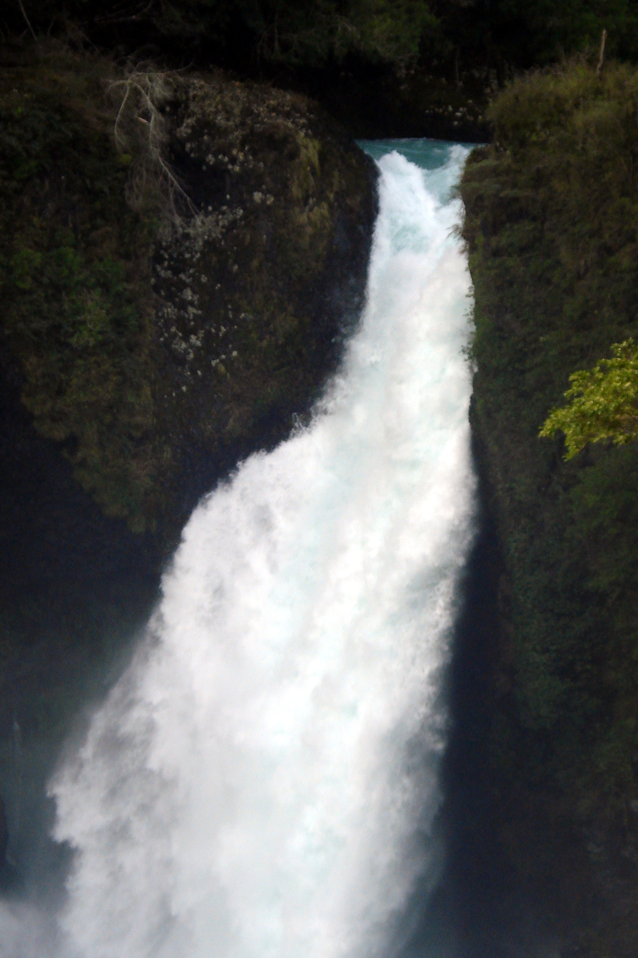 Saltos del Huilo-huilo en el río Fuy, comuna de Panguipulli, región de Los Ríos, Chile.